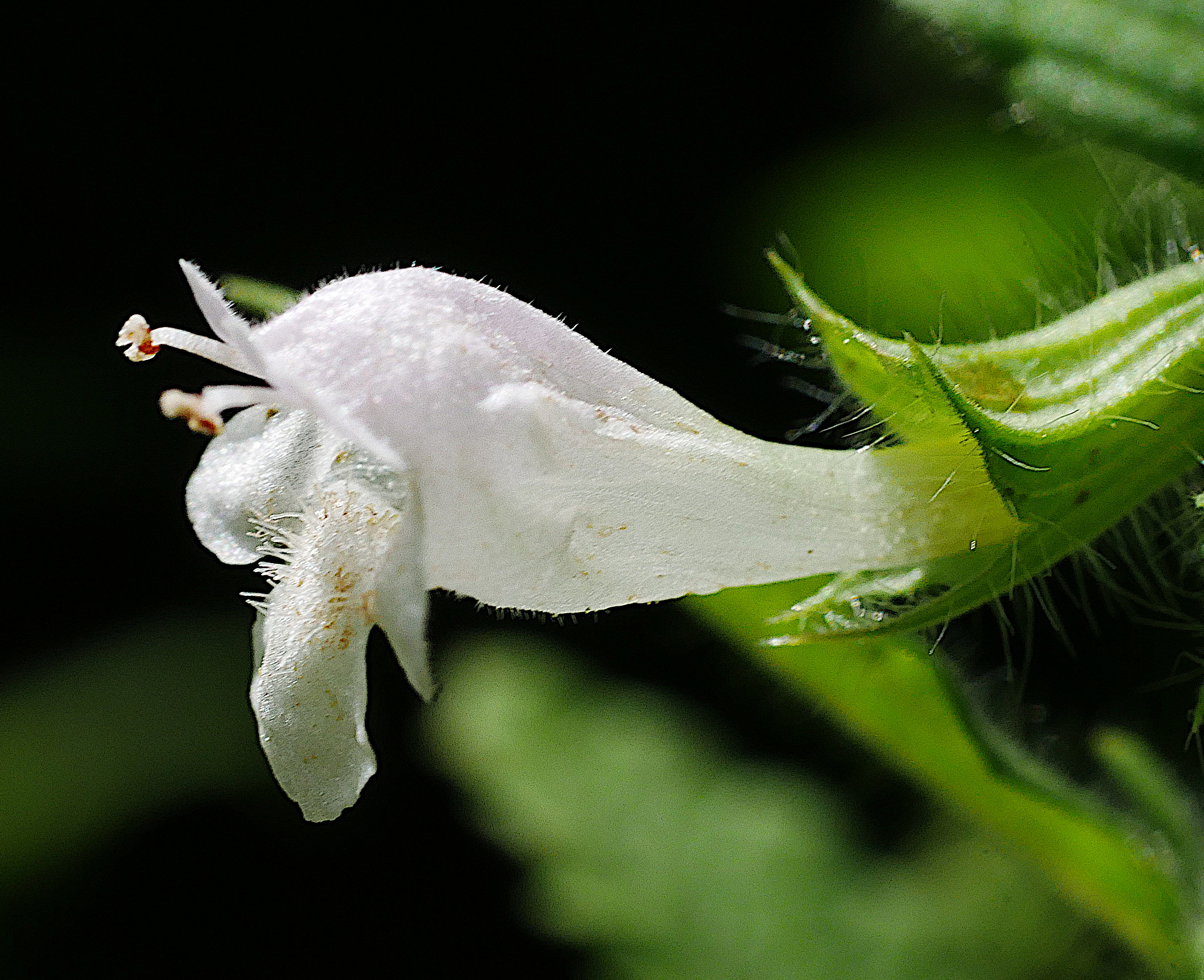 Zitronenmelisse (Melissa officinalis) im Freilichtmuseum Roscheider Hof. Standort: Kräutergarten